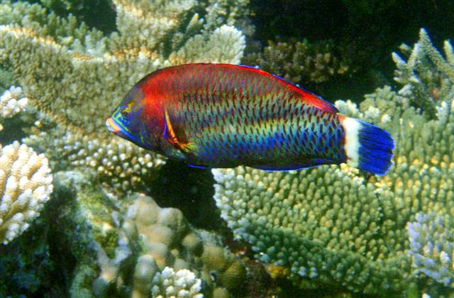 Pseudodax moluccanus